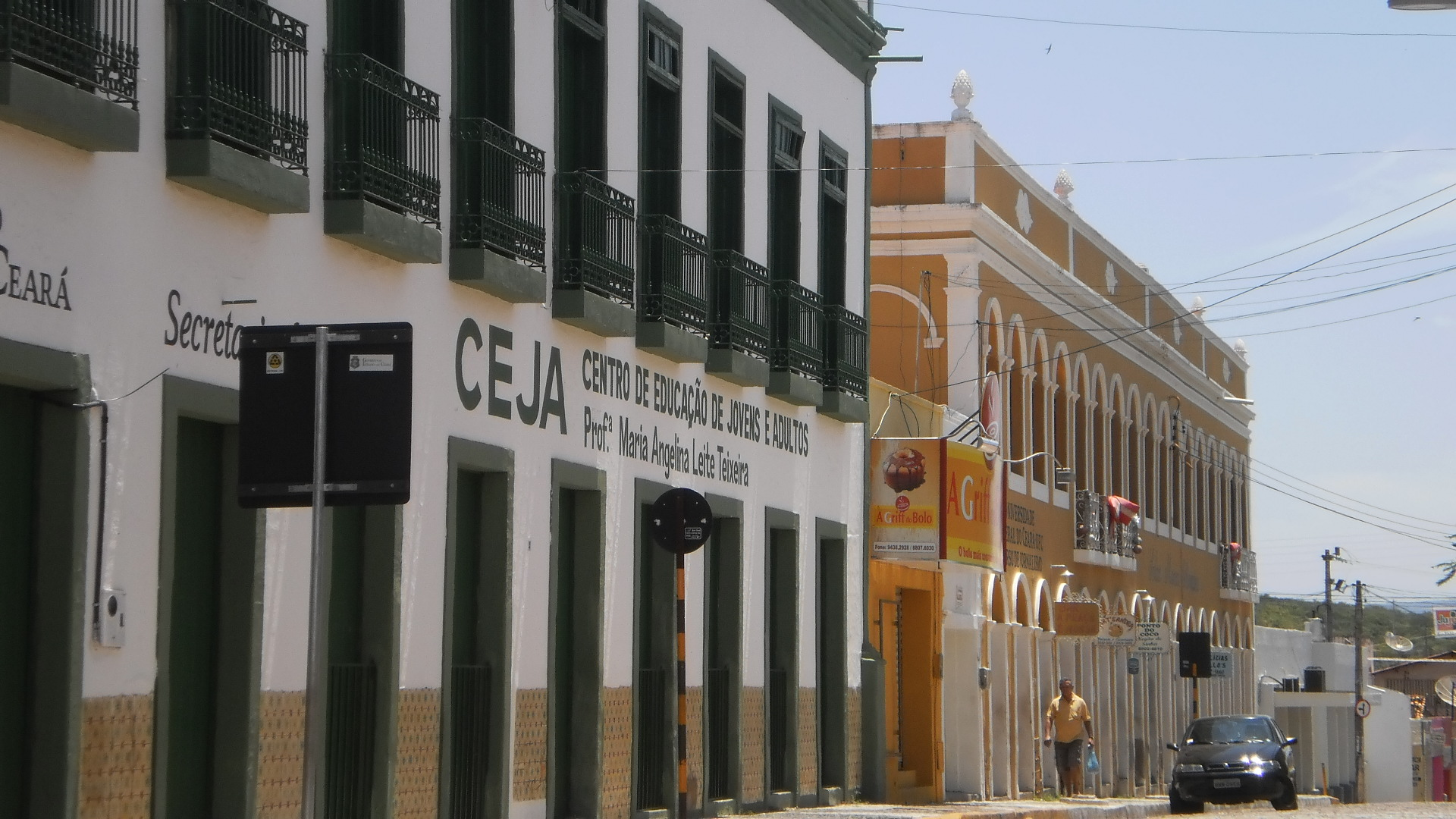 Prédios antigos do centro histórico de Barbalha - Ce